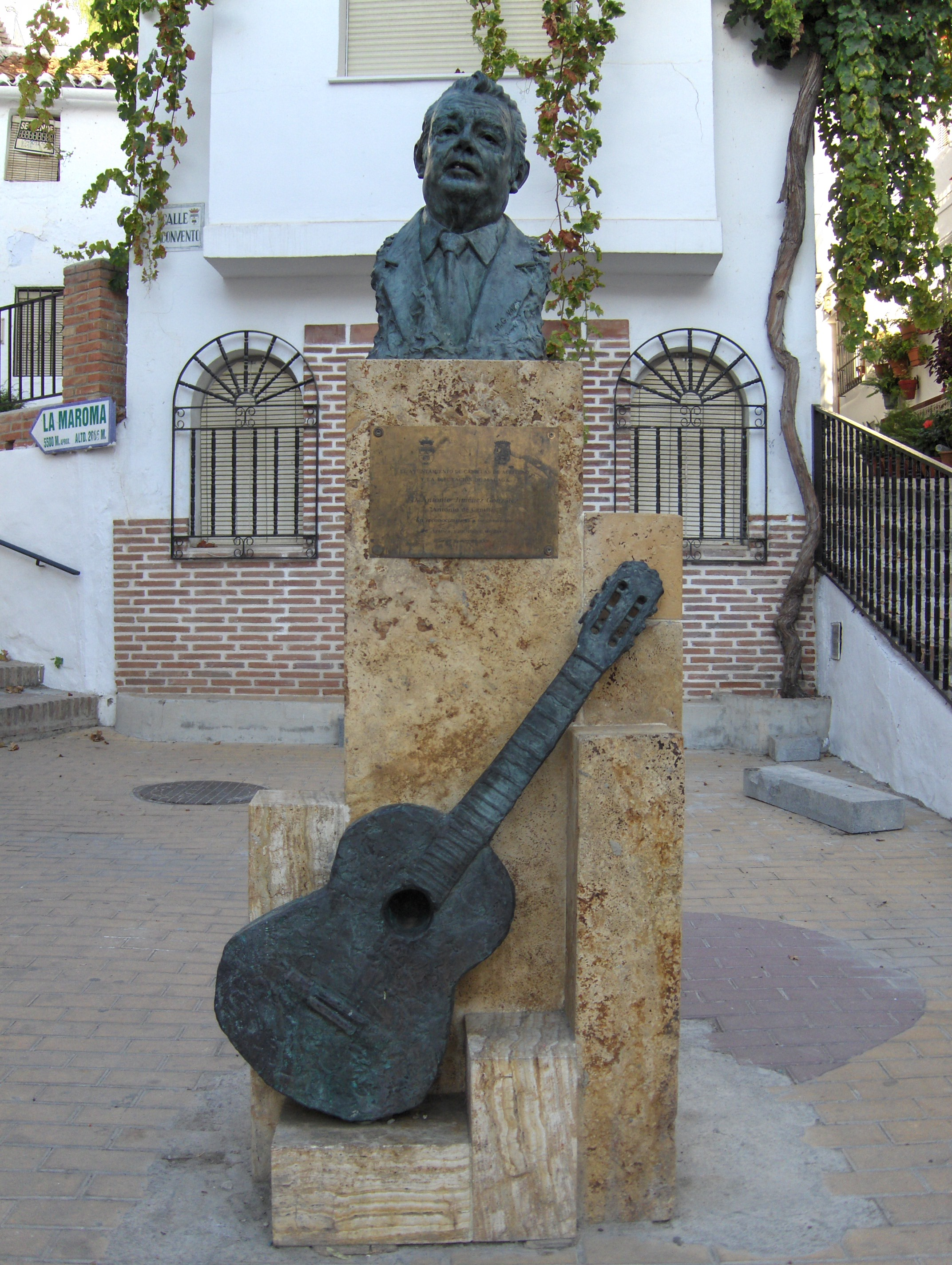 Monumento a Antonio de Canillas en Canillas de Aceituno